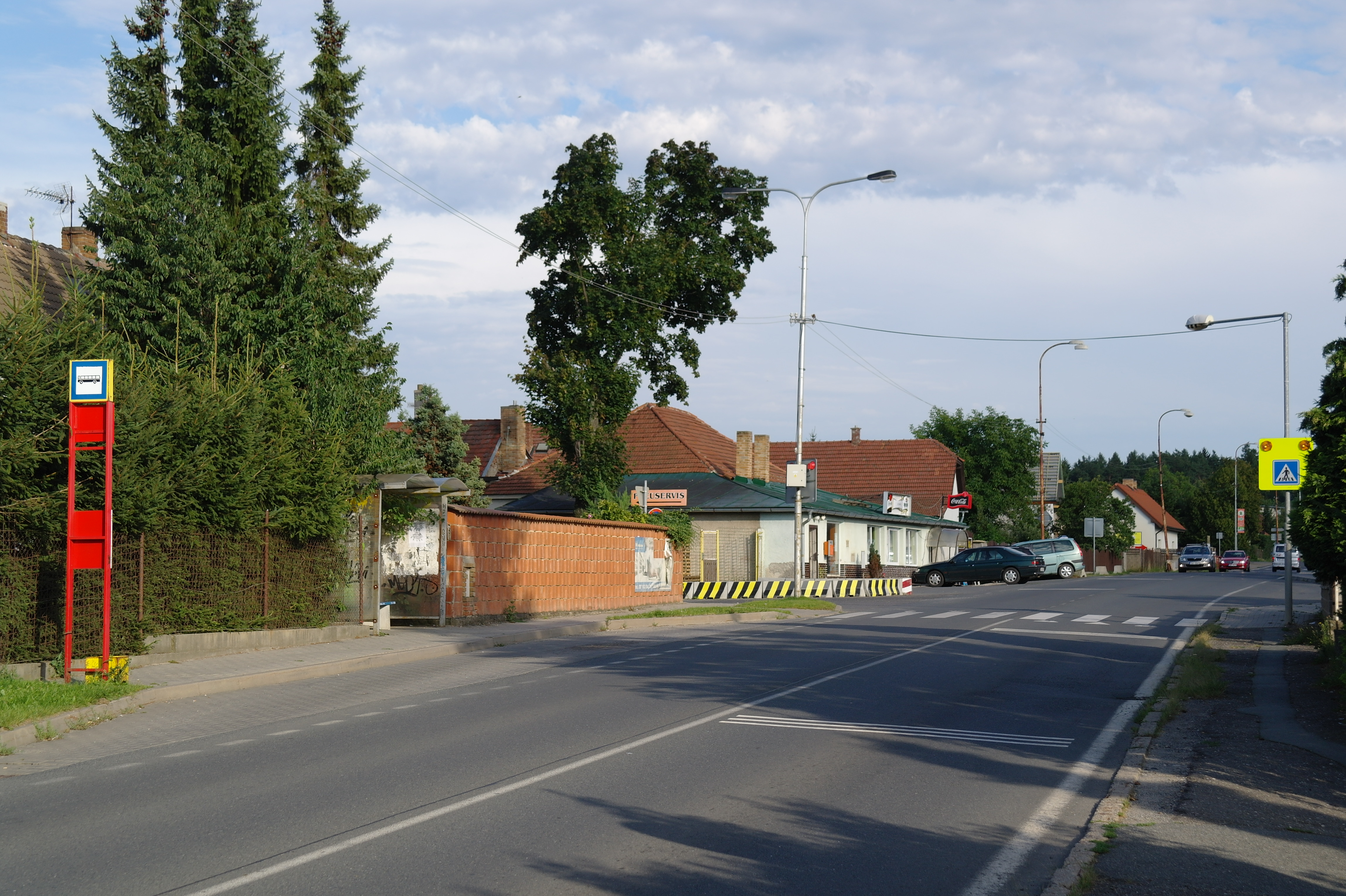 Střed vesnice Horní Jirčany